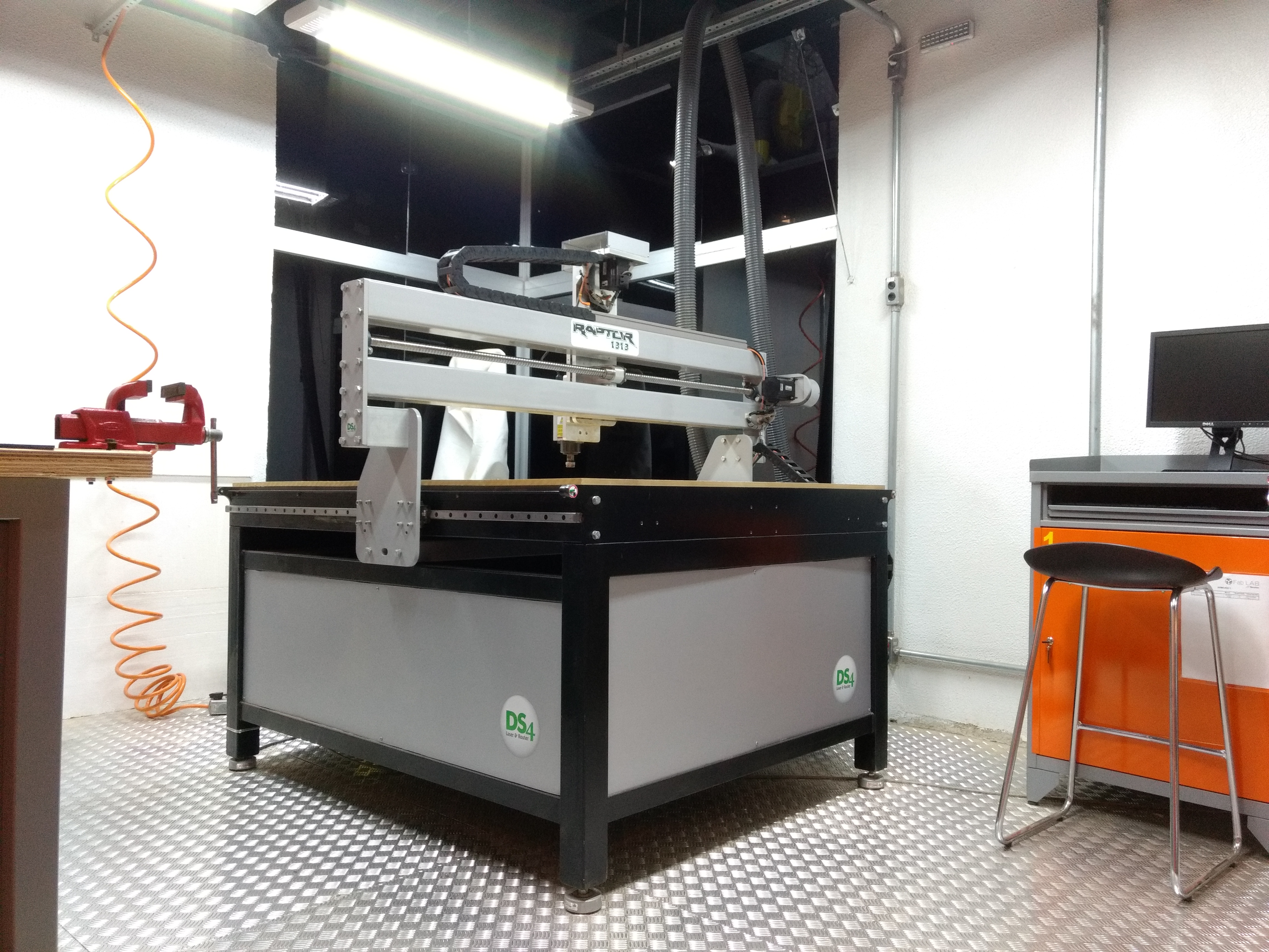 Fresadora disponível no FabLAB Newton